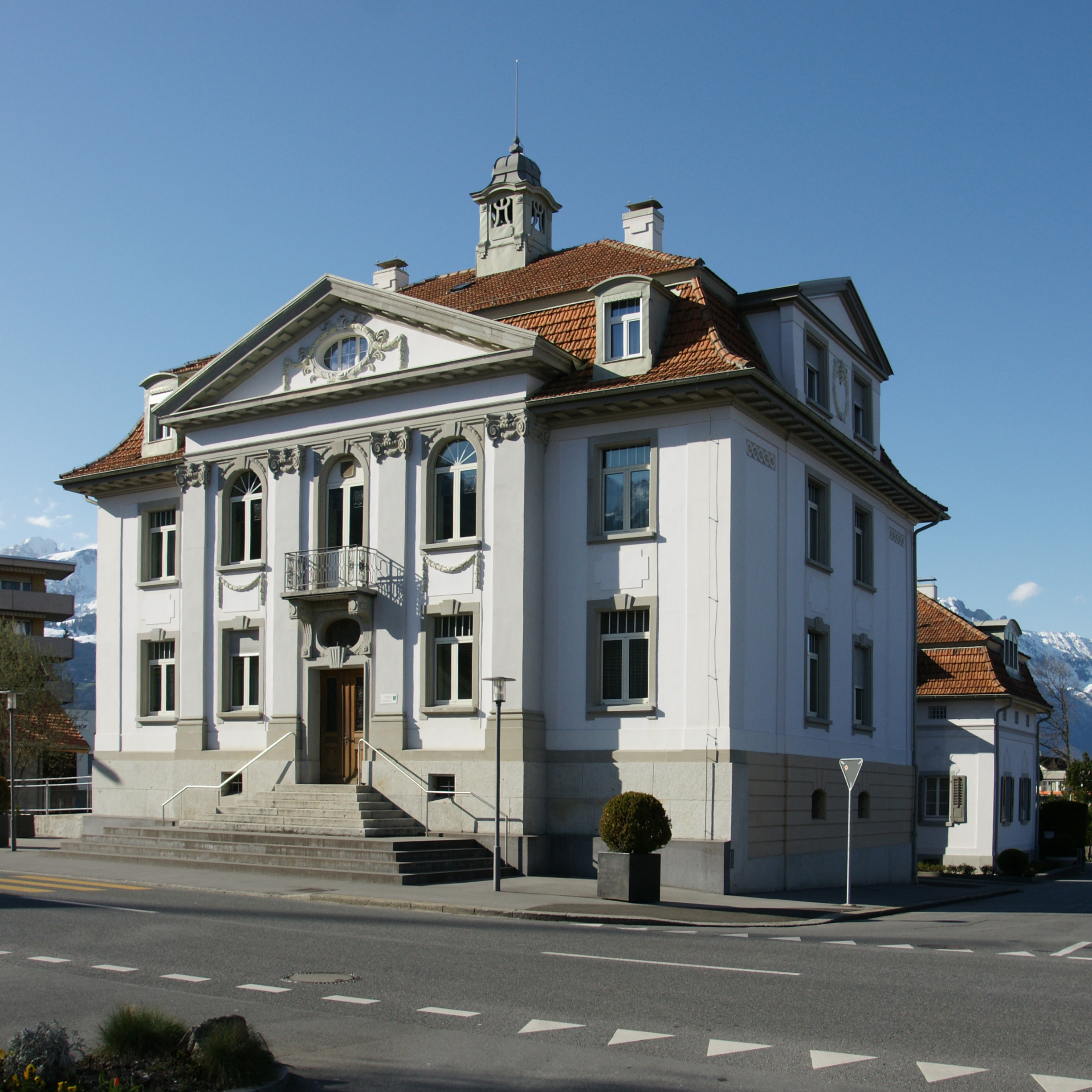 Bezirksgebäude. St.Gallerstrasse 6